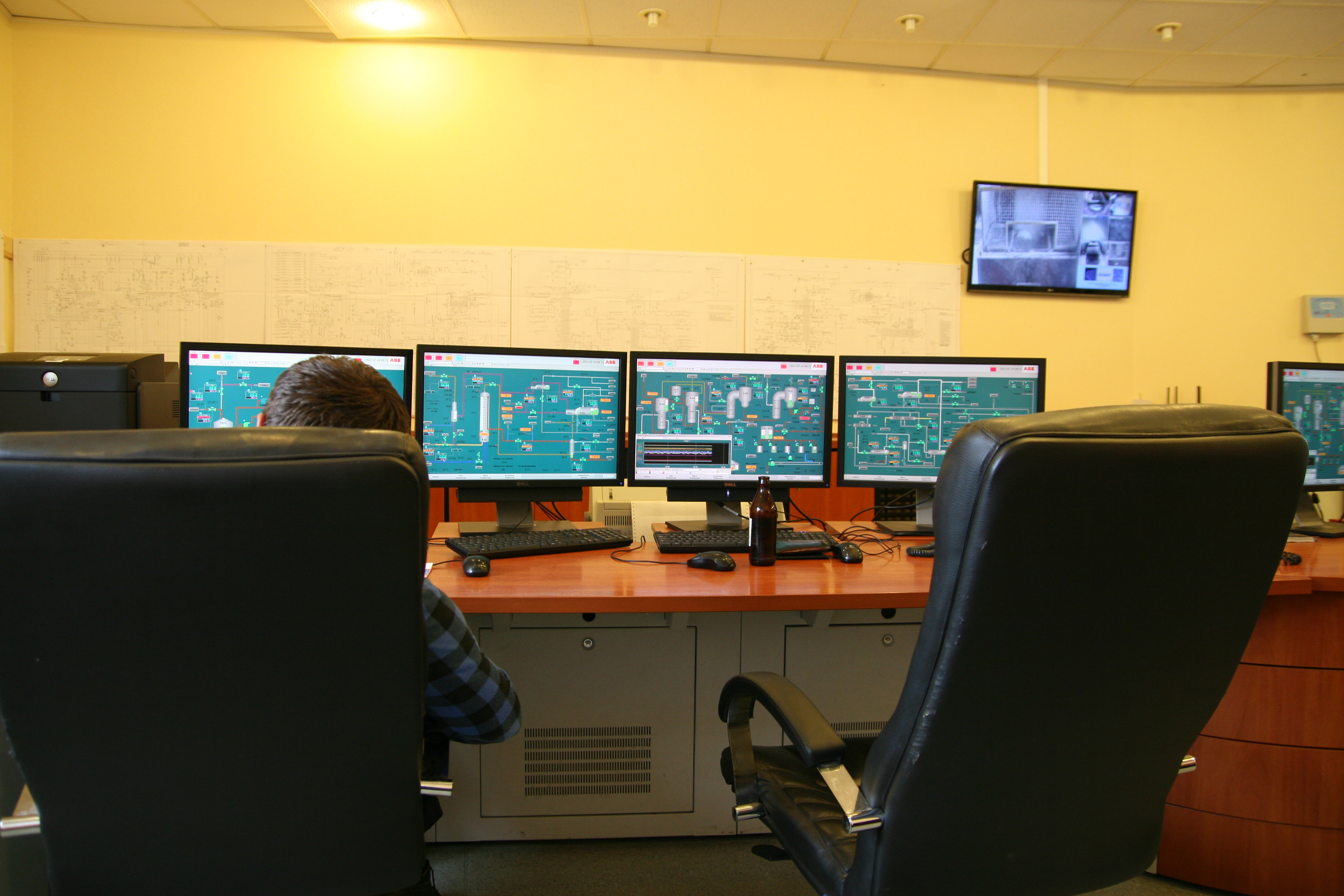 Sterownia w Grupie Azoty Zakładach Azotowych "Puławy" S.A.